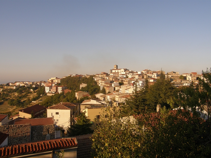 Apulia Molise Campania 2009